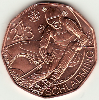 Austrian five-Euro coin